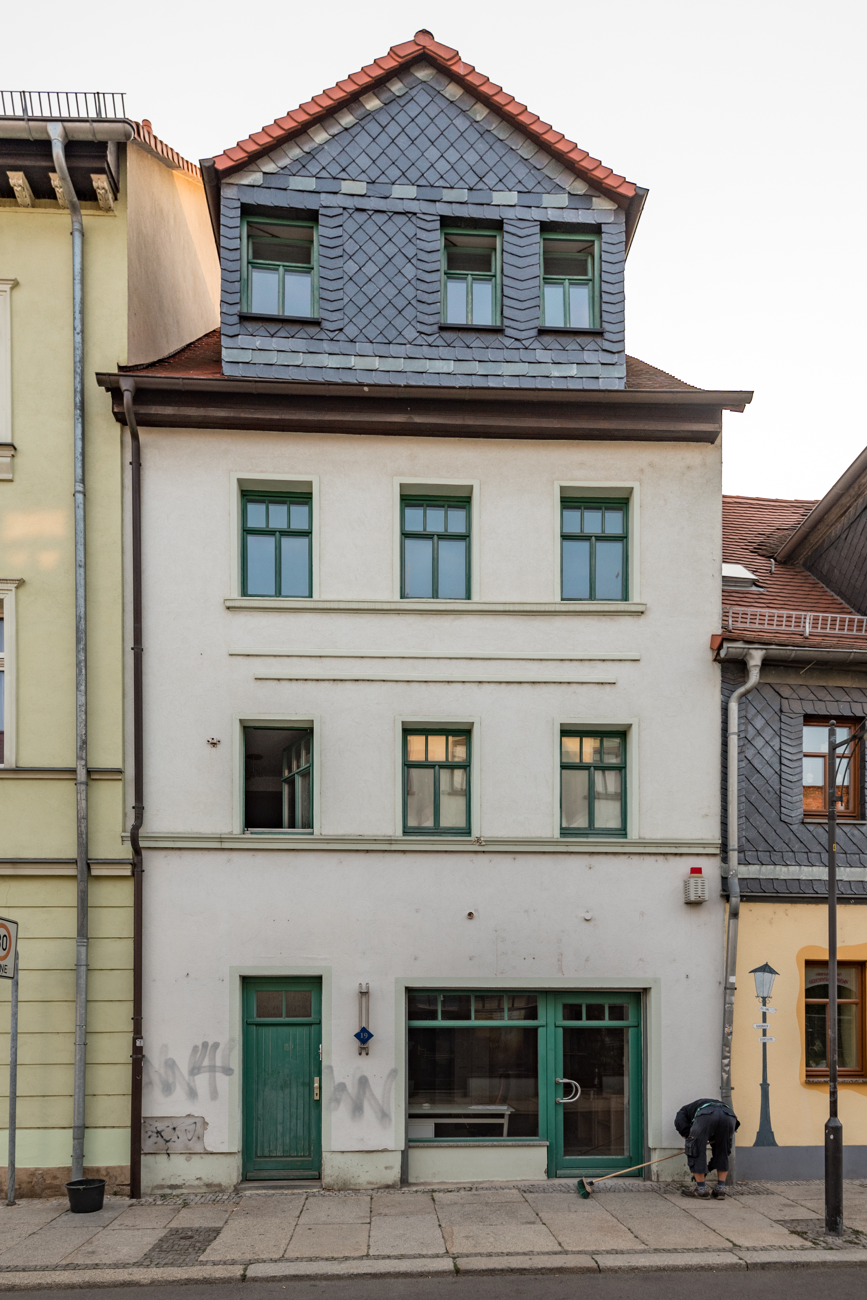 Weißenfels, Kleine Kalandstraße 19